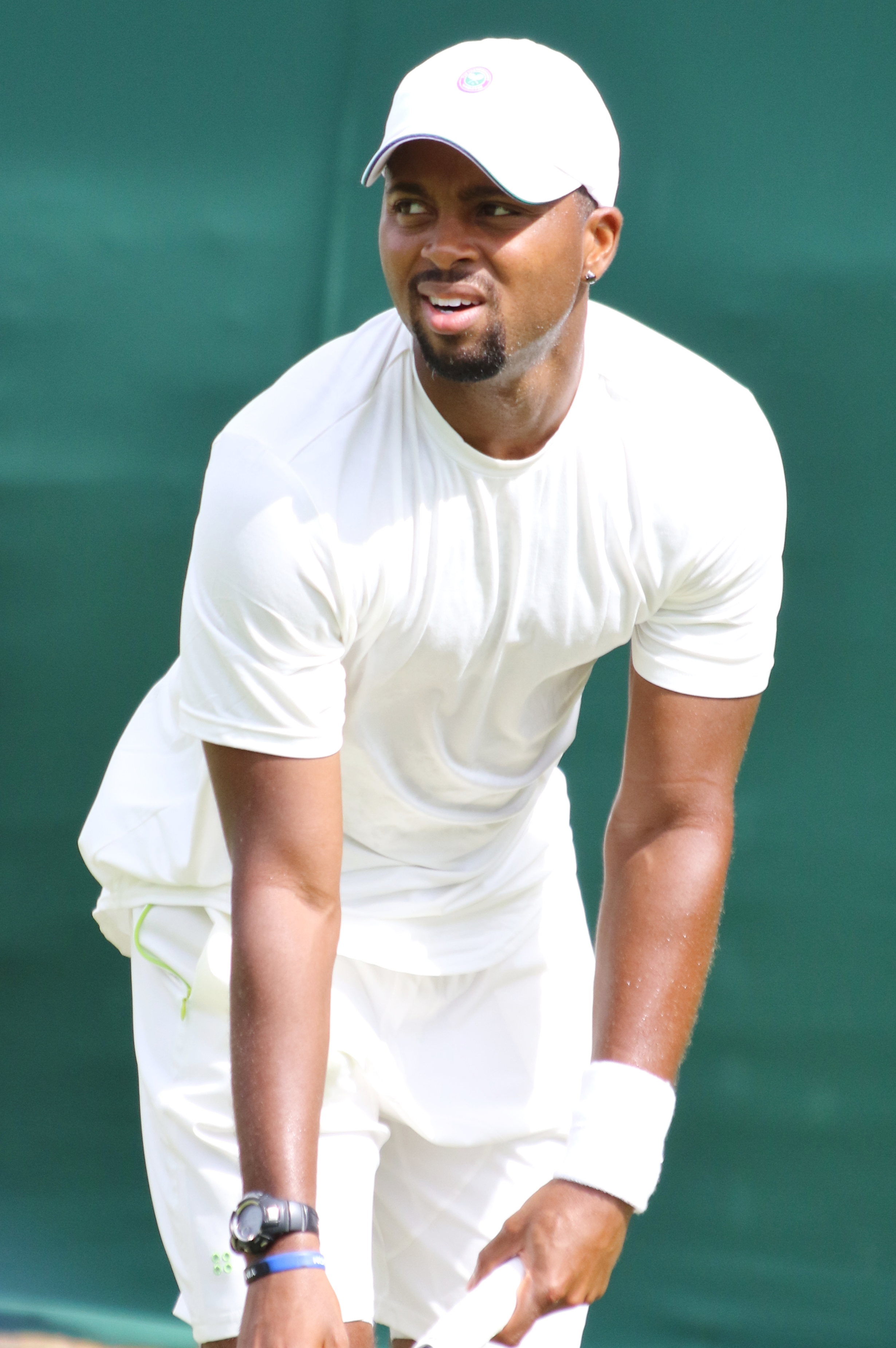 Young WM17 (3)